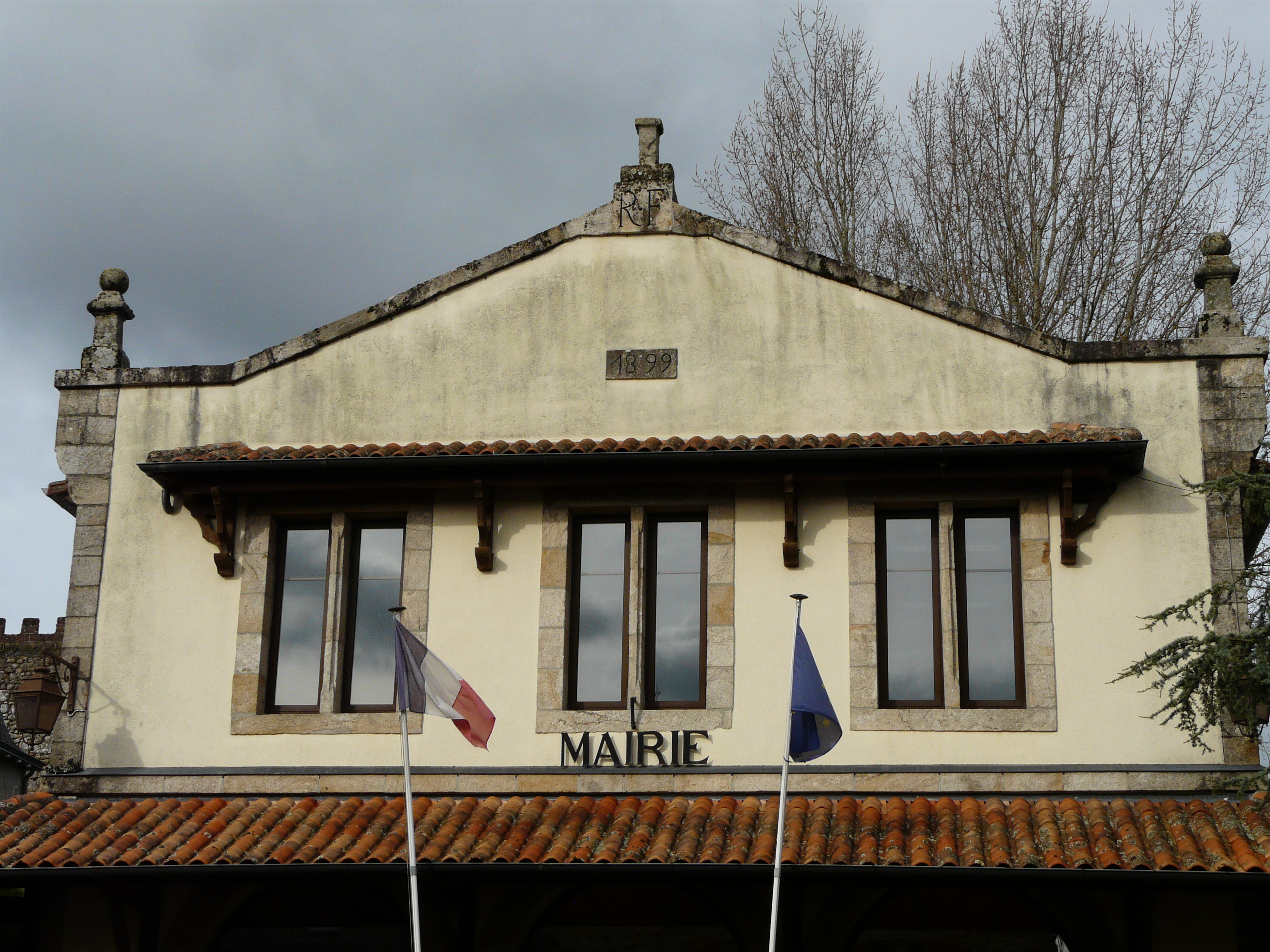 L'étage de la mairie de Champniers-et-Reilhac, Dordogne, France.